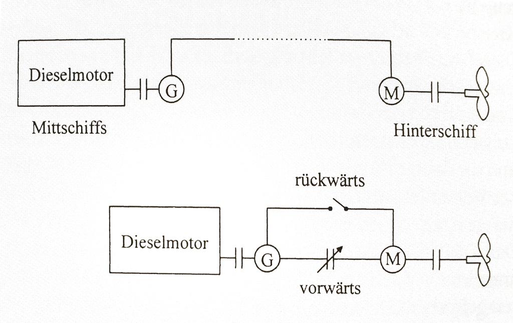 Unterschied im Antrieb der VANDAL und SSARMAT